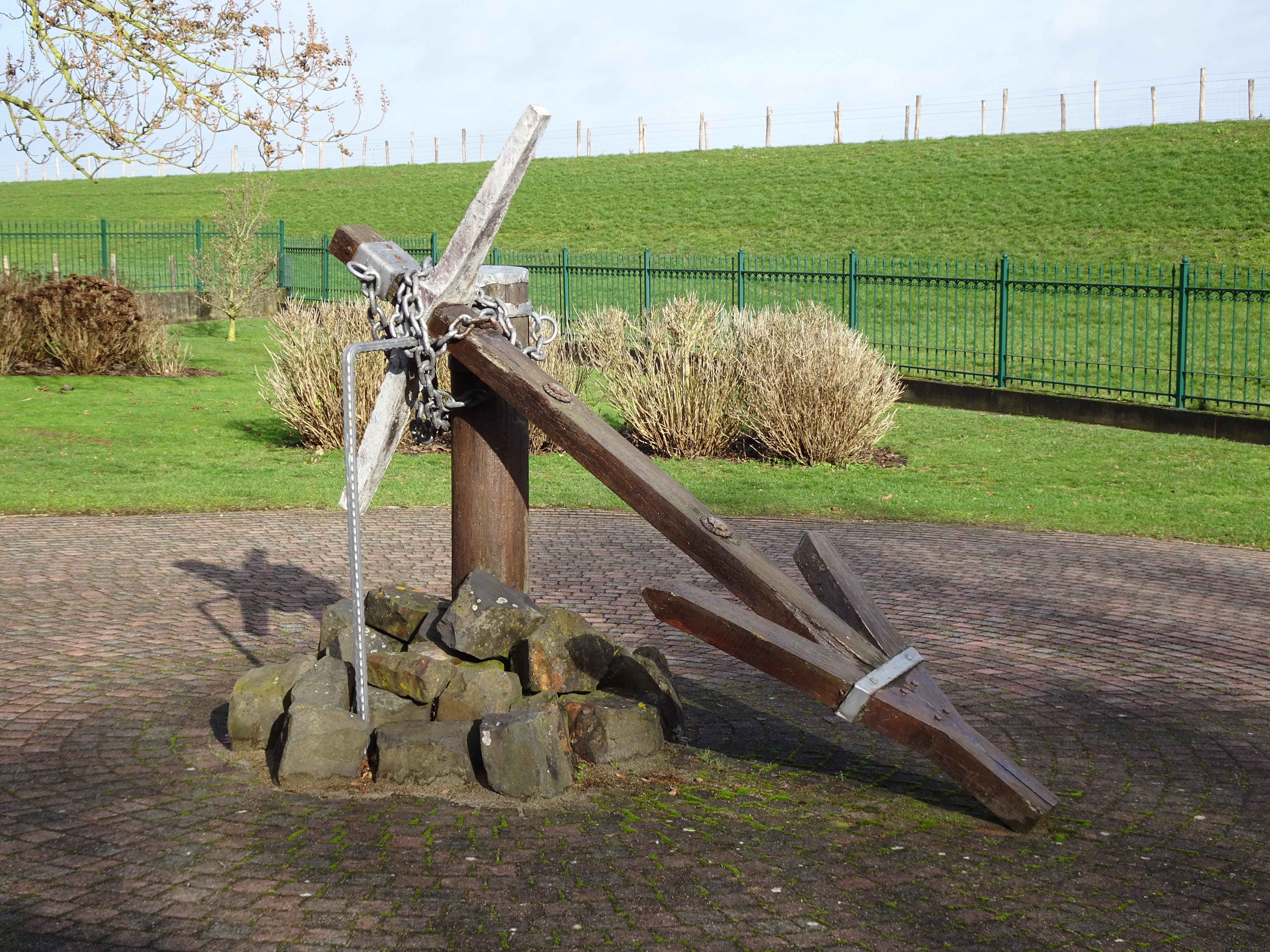 Kalkar-Grieth, Haus Grieth, anker van een Romeins vrachtschip uit ca. 65 n. Chr. gevonden bij Grieth